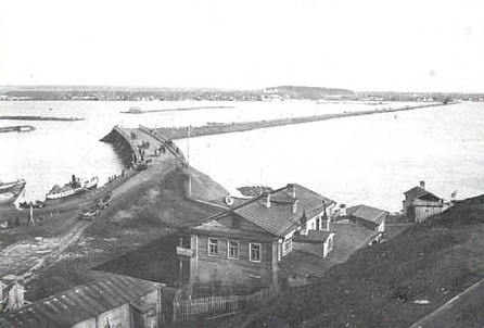 Кизическая дамба (ныне Кремлёвская транспортная дамба, а чуть ранее Ленинская дамба) образца конца 19 века.